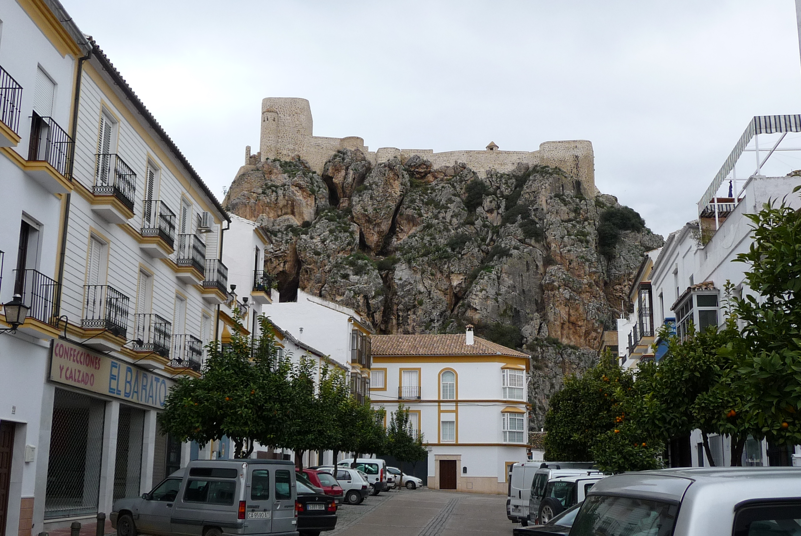 Olvera-p1000523.jpg